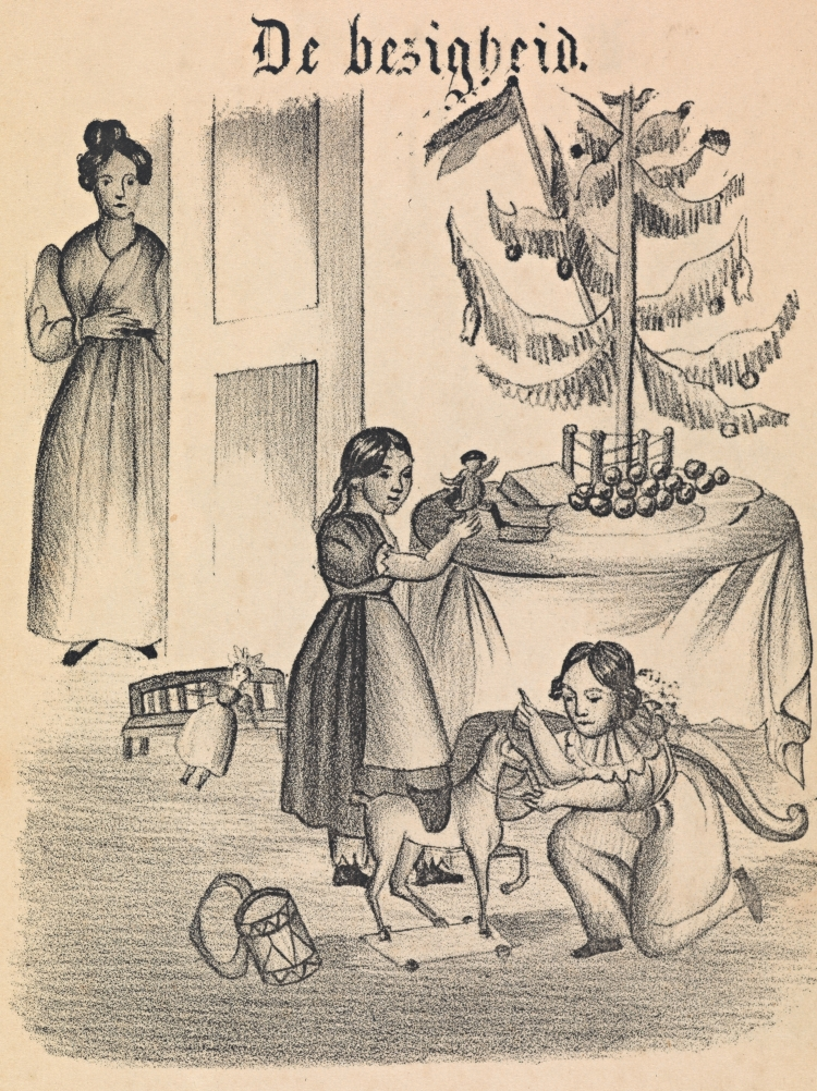 Kinderen spelen met speelgoed bij de kerstboom terwijl moeder toekijkt bij de deur. Uit: De moeder in 12 afbeeldingen met toepasselijke versjes voor kinderen, 1842. Signatuur: KW Ki 5634.